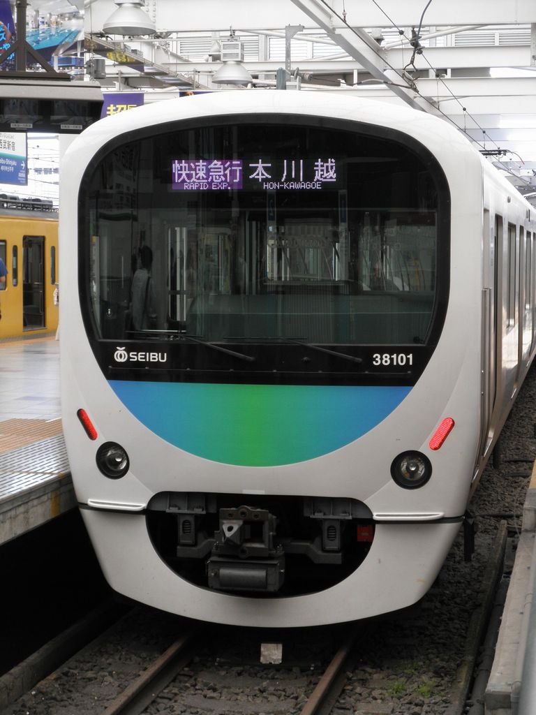 2012年6月29日の運転を持って消滅した西武新宿線の快速急行。末期は、最新鋭の30000系も快速急行に使用していた。